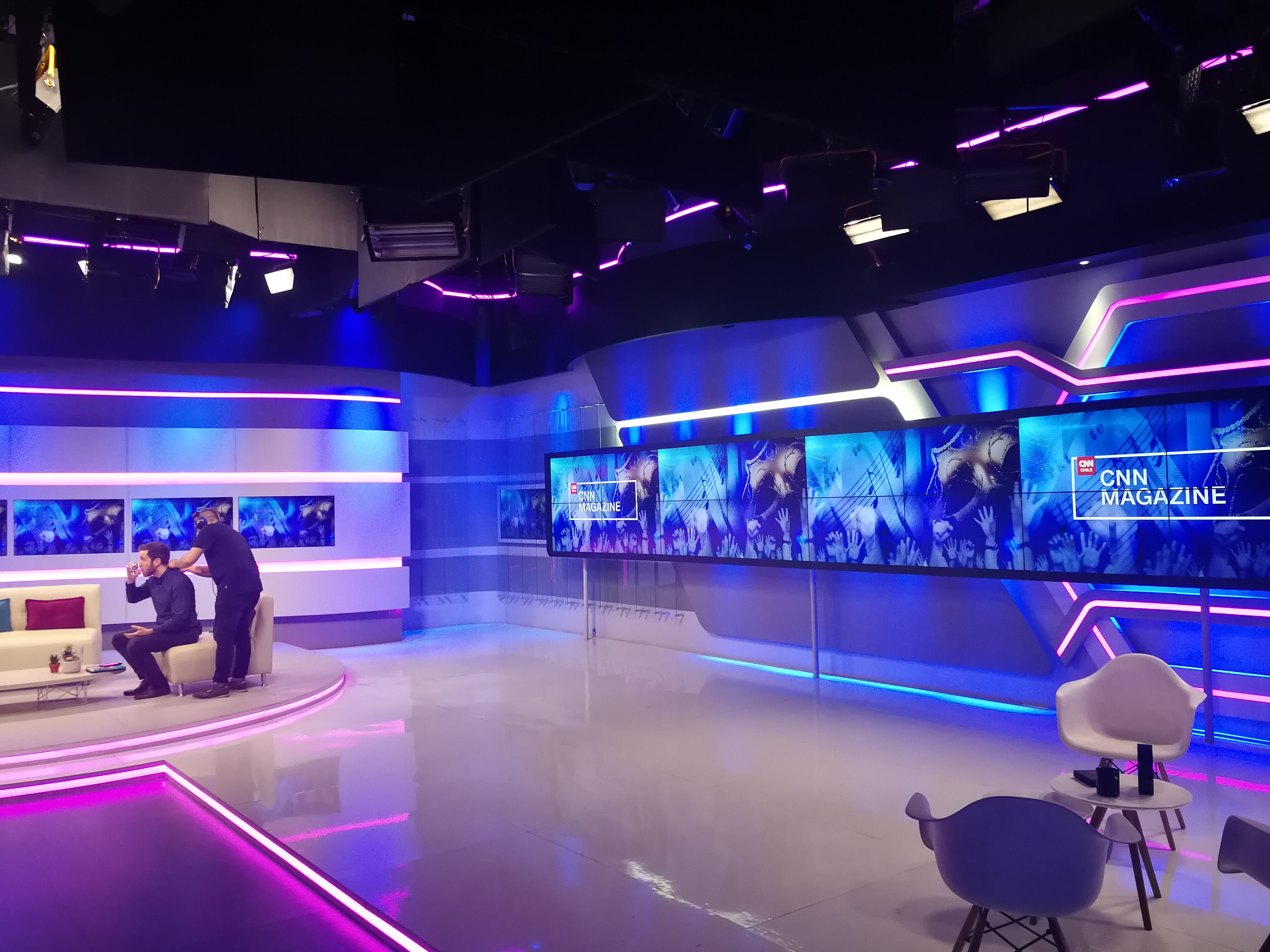 Estudio de CNN Chile tras la emisión del programa CNN Magazine.